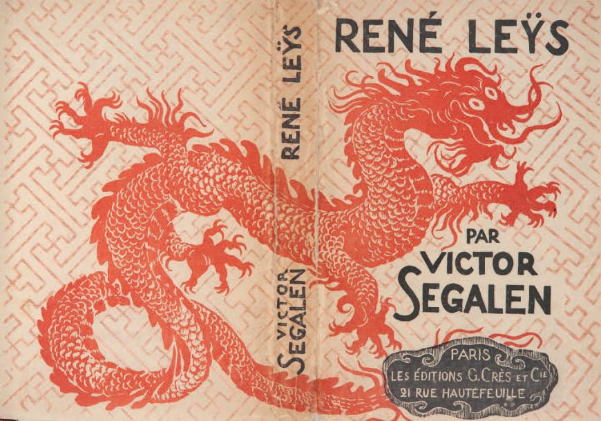 Victor Segalen, René Leys, Paris, Georges Crès et Cie, 1922 Couverture illustrée par Georges-Daniel de Monfreid.